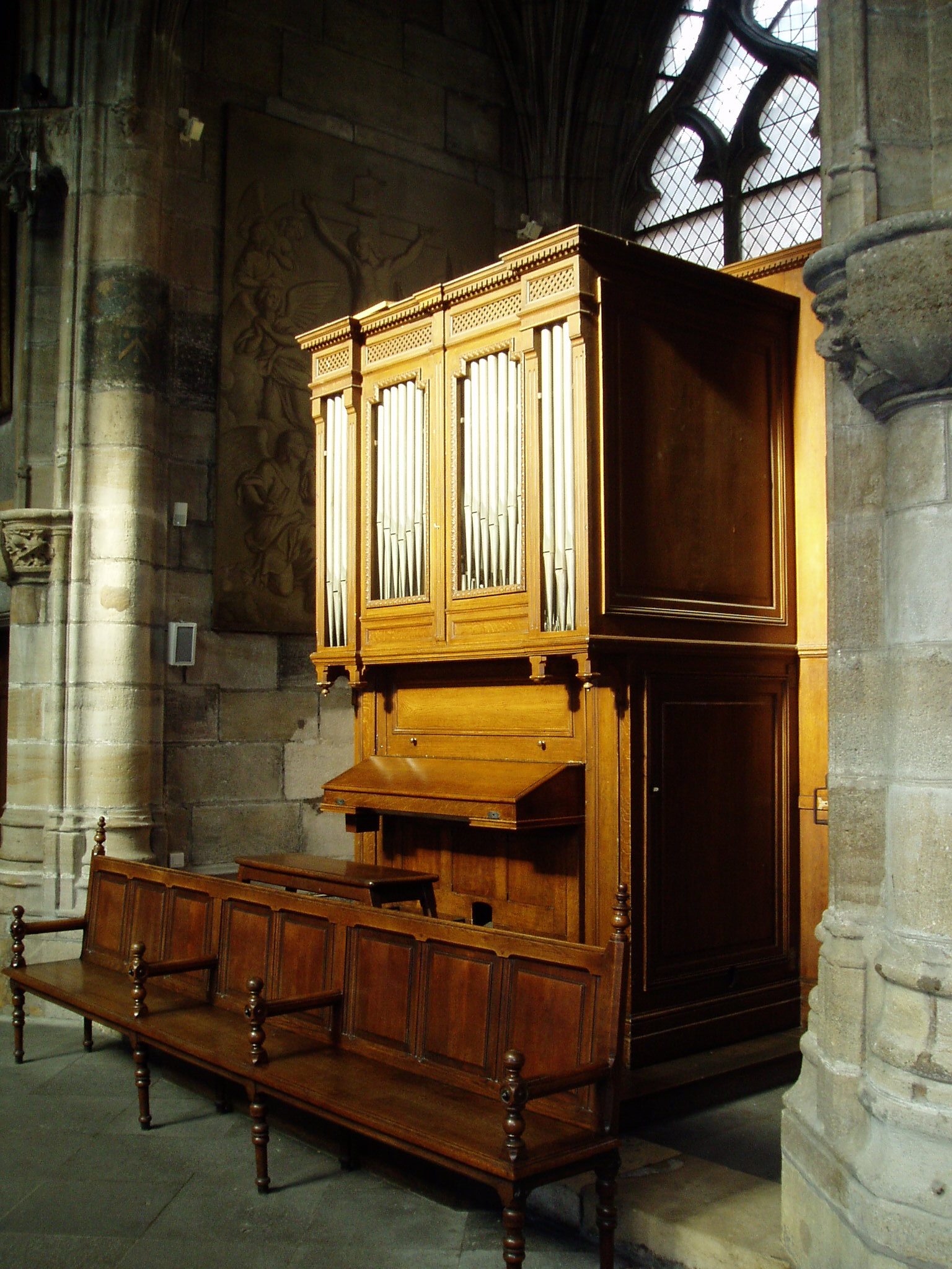 Orgue de choeur de la cathédrale de Moulins (Allier-France)